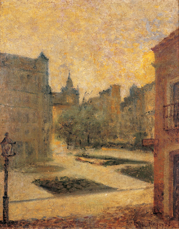 Plaza de Bilbao.title QS:P1476,es:"Plaza de Bilbao." label QS:Les,"Plaza de Bilbao."